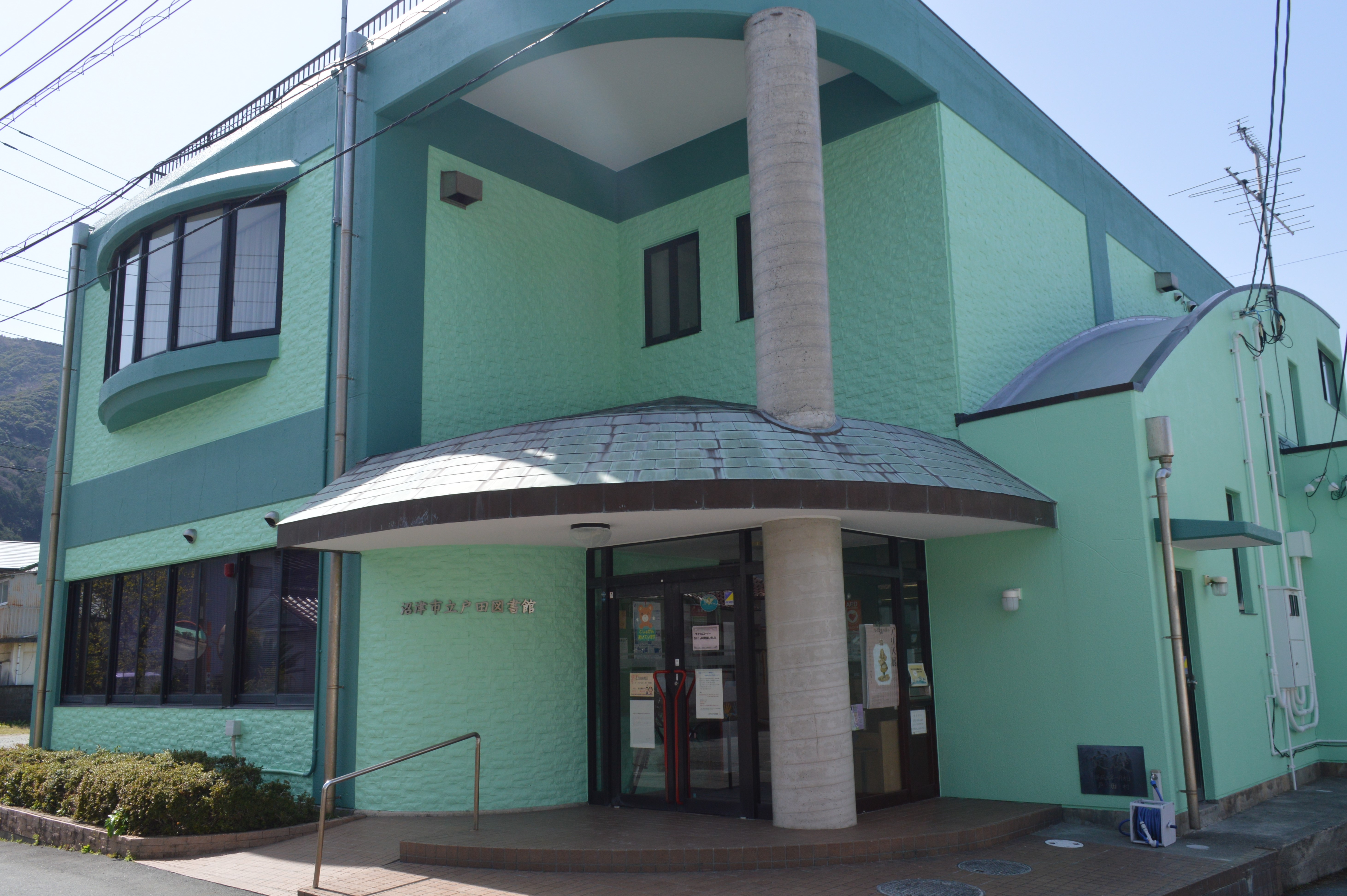 静岡県沼津市戸田にある沼津市立戸田図書館。